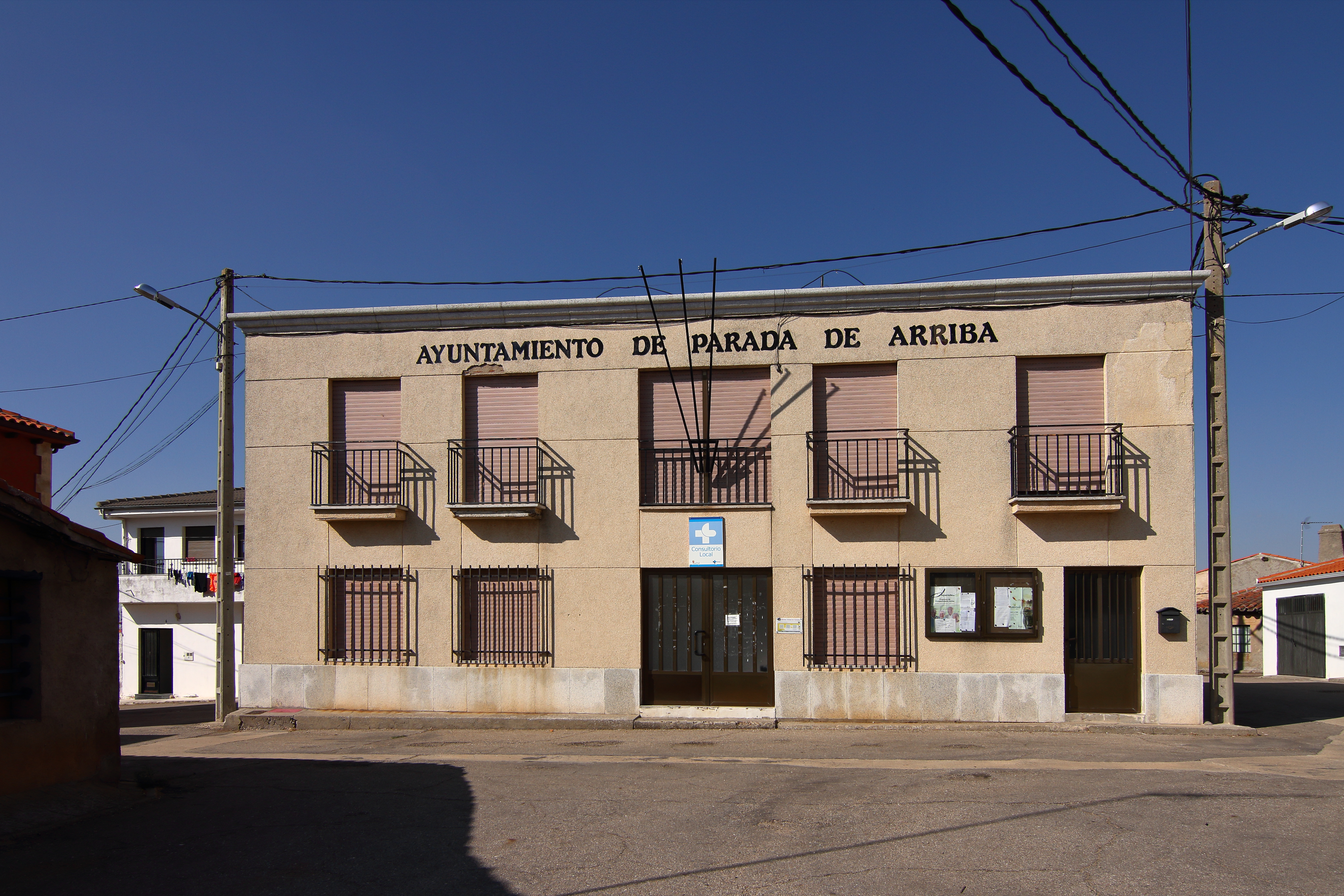 Ayuntamiento de Parada de Arriba